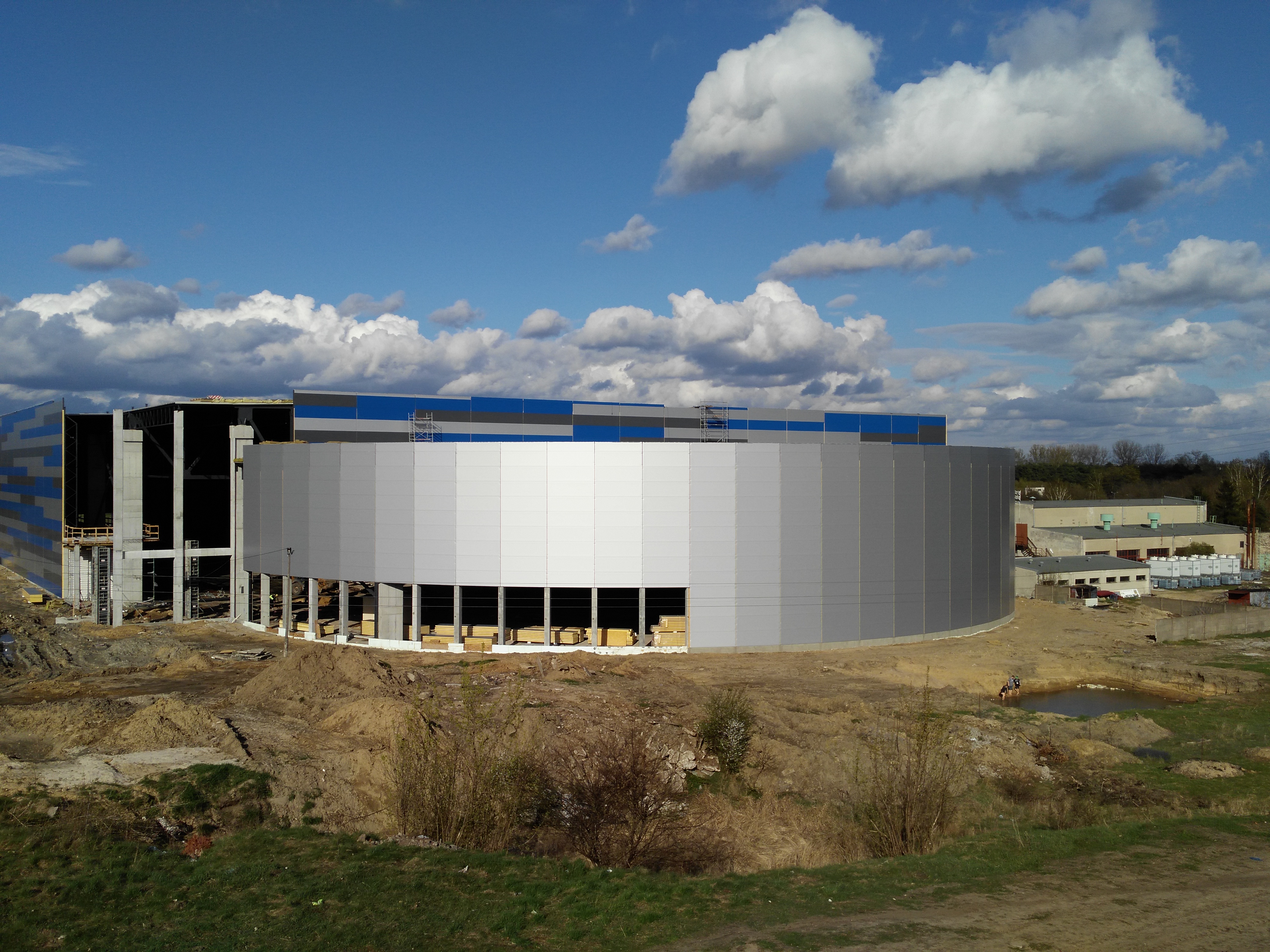 Pierwsza w Polsce, kryta Arena Lodowa w Tomaszowie Mazowieckim, stan prac na kwiecień 2017